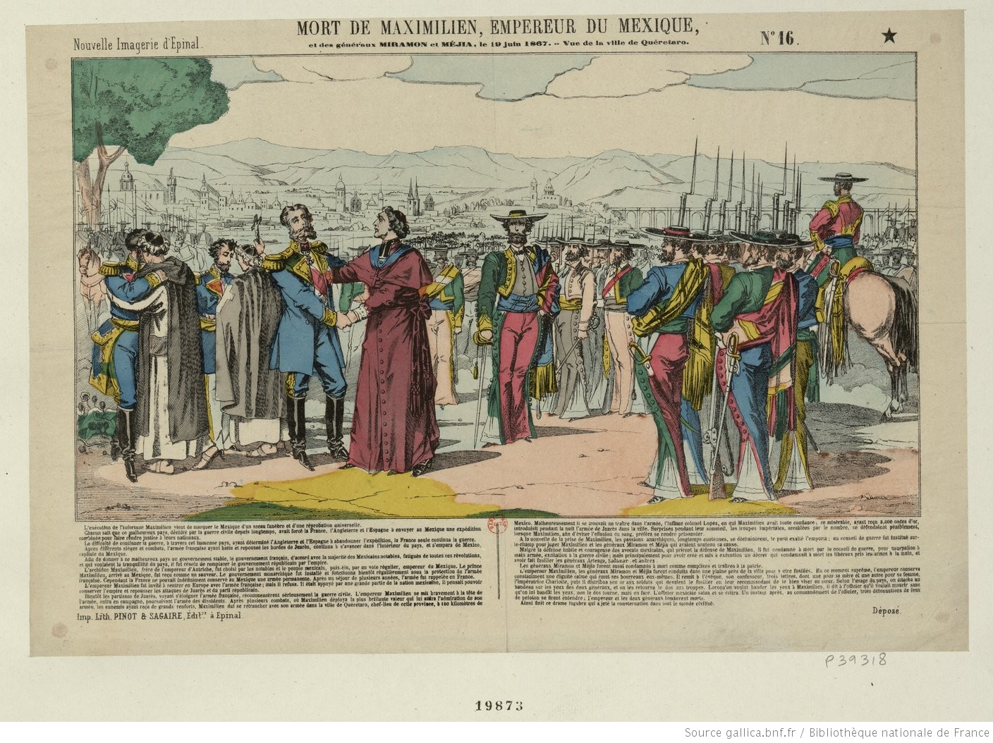 Un groupe de soldats entoure l'empereur Maximilien sur la colline de Querétaro